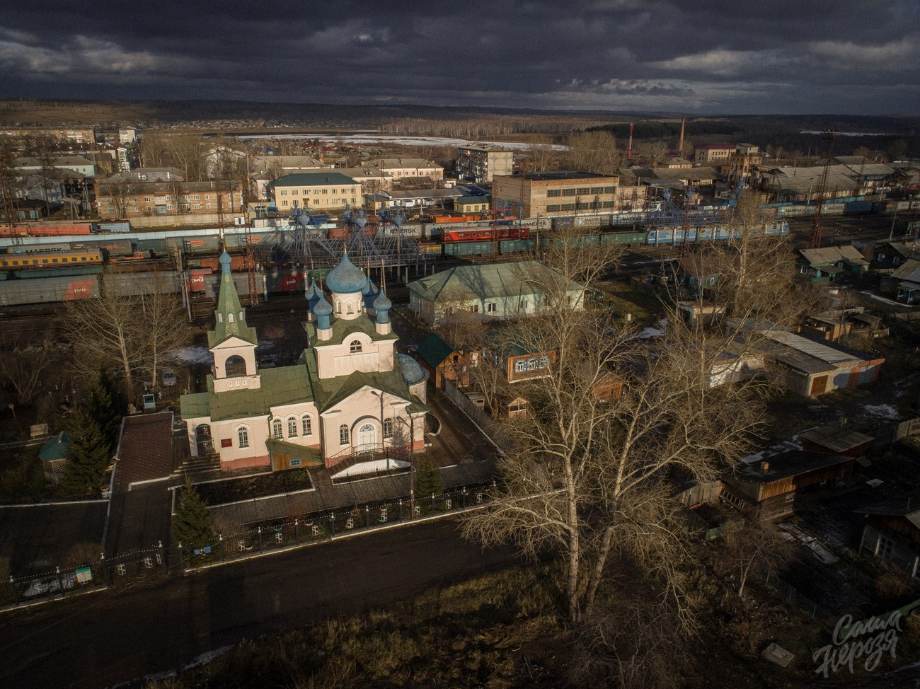 С мая 1989 года началось строительство нового каменного храма, который строили всем миром. Первое богослужение в храме состоялось 14 октября 1991 года.